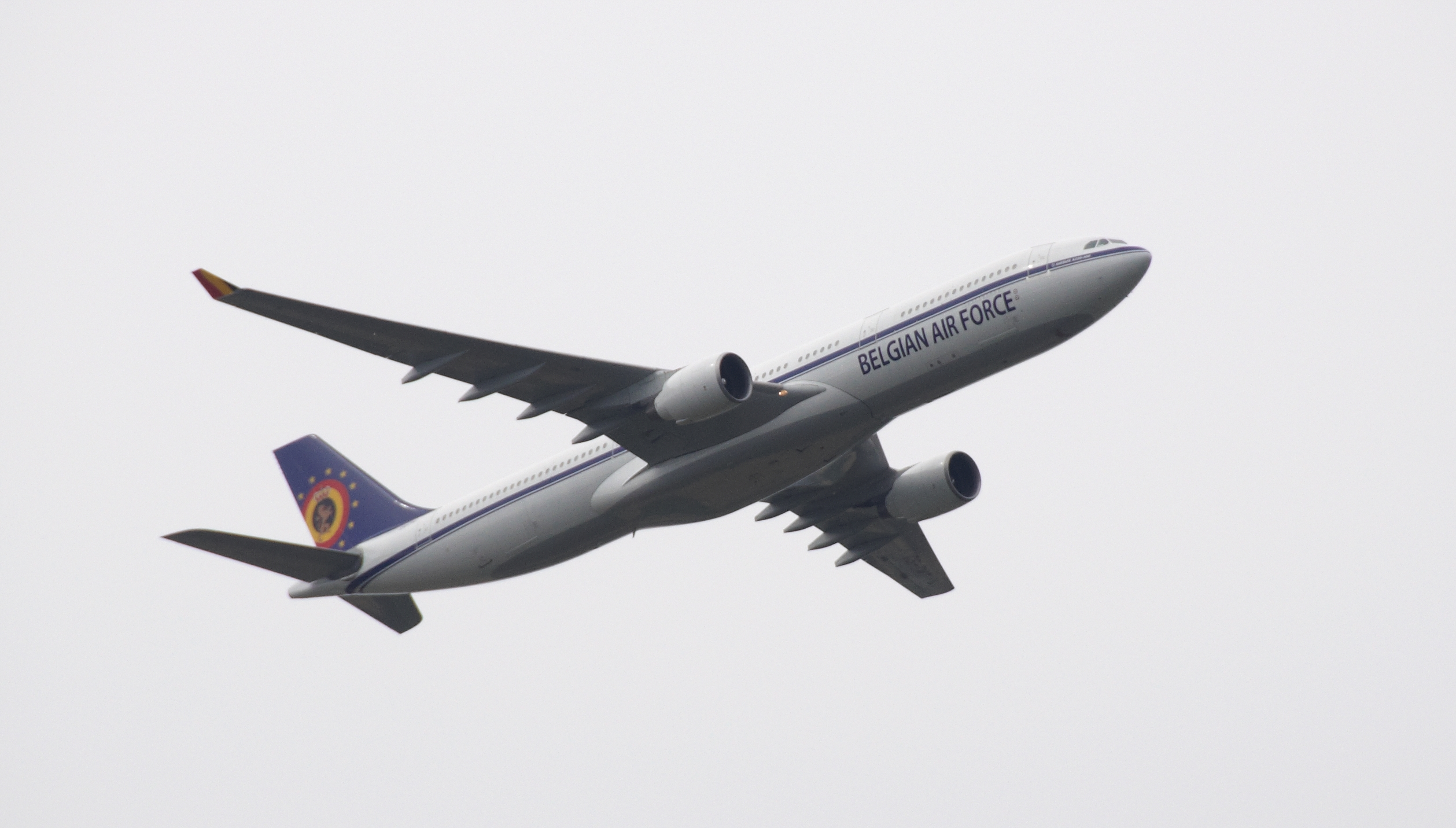 Airbus A330 militair vliegtuig ter gelegenheid van 21 juli nationale feestdag in België